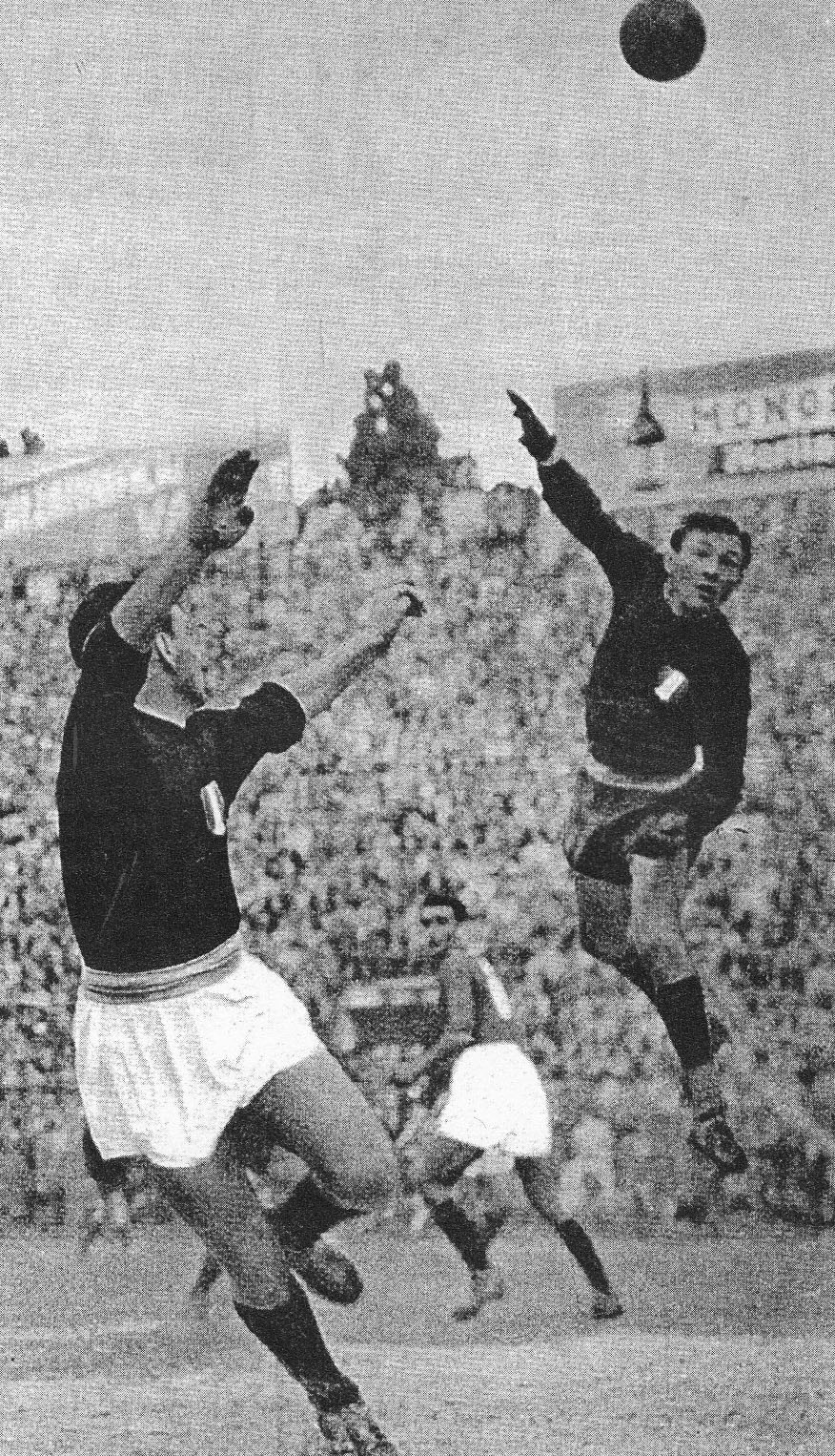 Il portiere di calcio italiano Valerio Bacigalupo (a destra) in azione al Grande Torino nella seconda metà degli anni 40 del XX secolo.